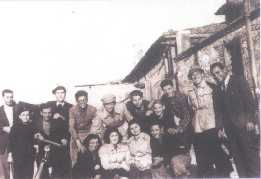 מעפילים מכל תנועות הנוער בהמתנה להפלגת הסלבדור כפי שצולמו בווארנה ובינהם צבי סוזין